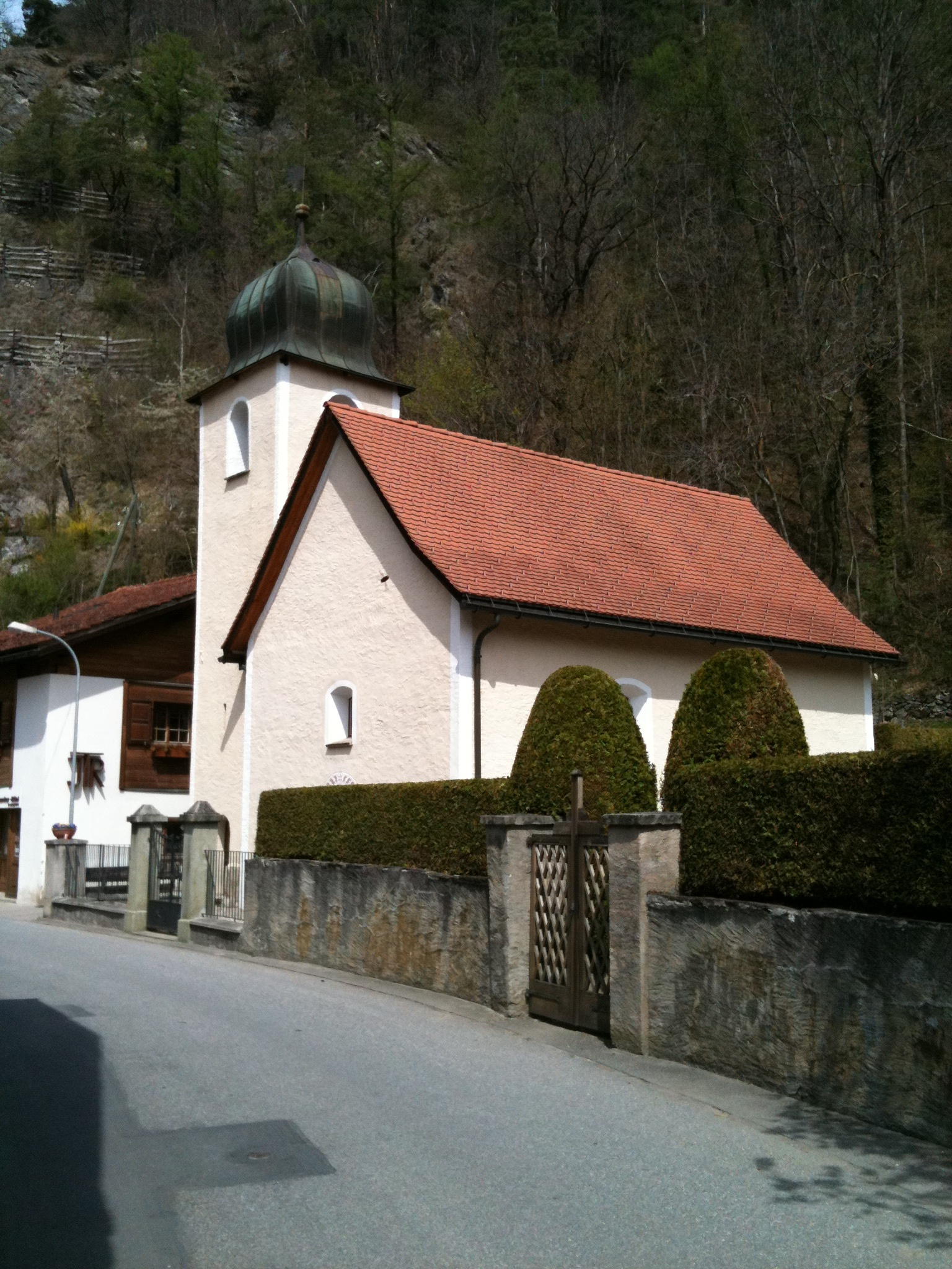 Reformierte Kirche Rothenbrunnen, Kanton Graubünden